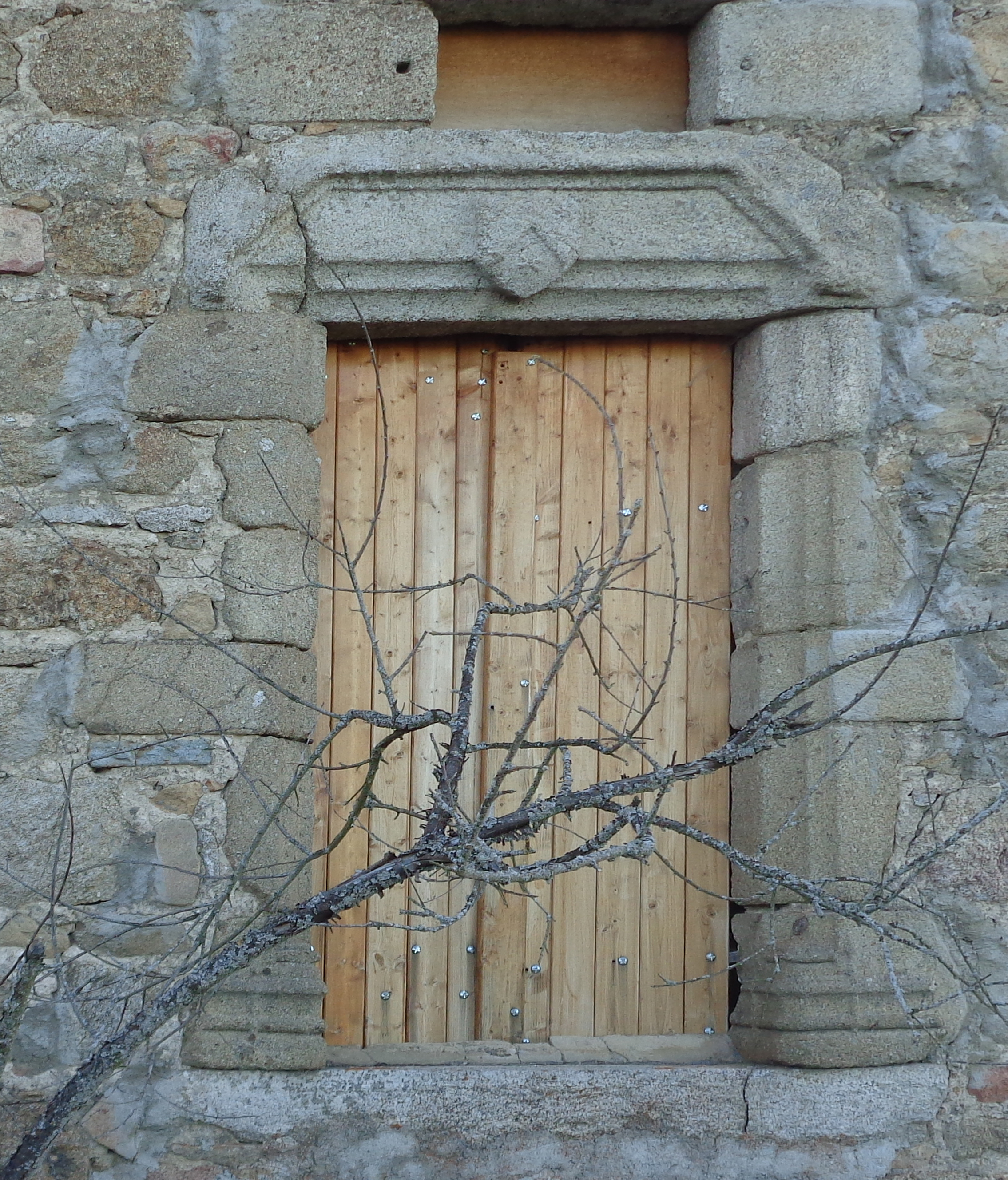 Porte avec le blason des Beaufranchet